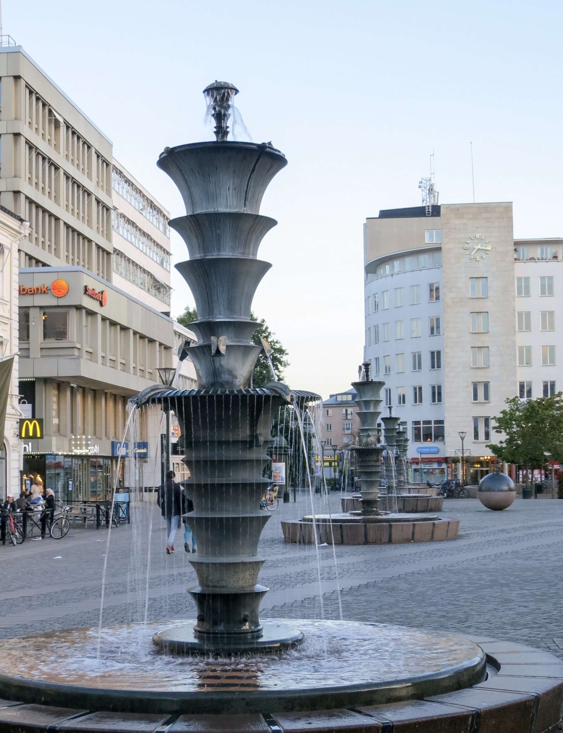 Fem fontäner och ett klot, skulpturer på Gustav Adolfs torg i Malmö